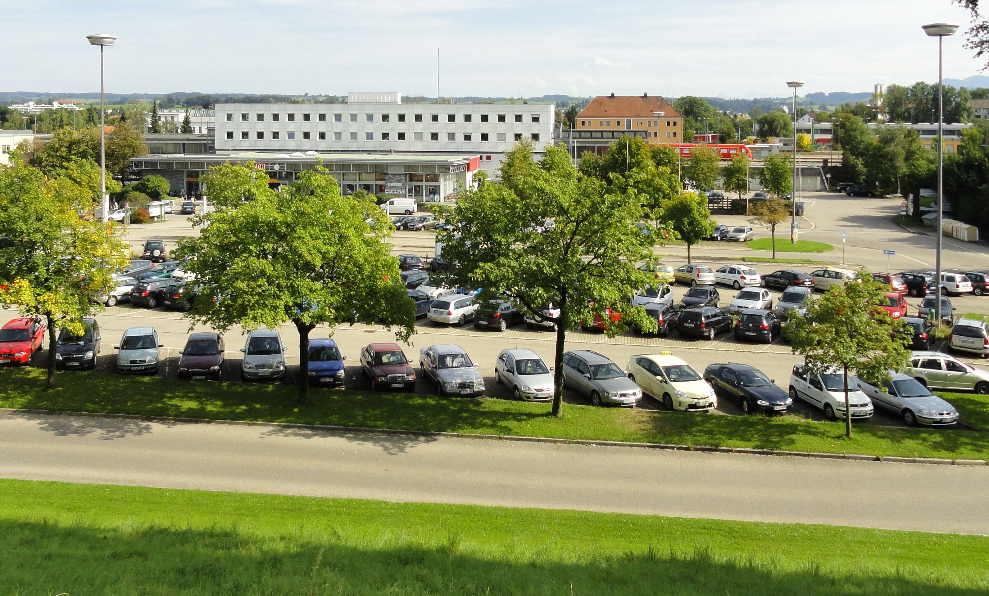 Hauptbahnhof Kempten (Allgäu) - Blick vom Mittleren Ring